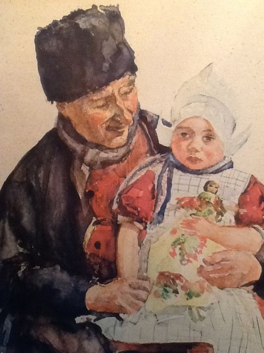 Grootvader met kleinzoon